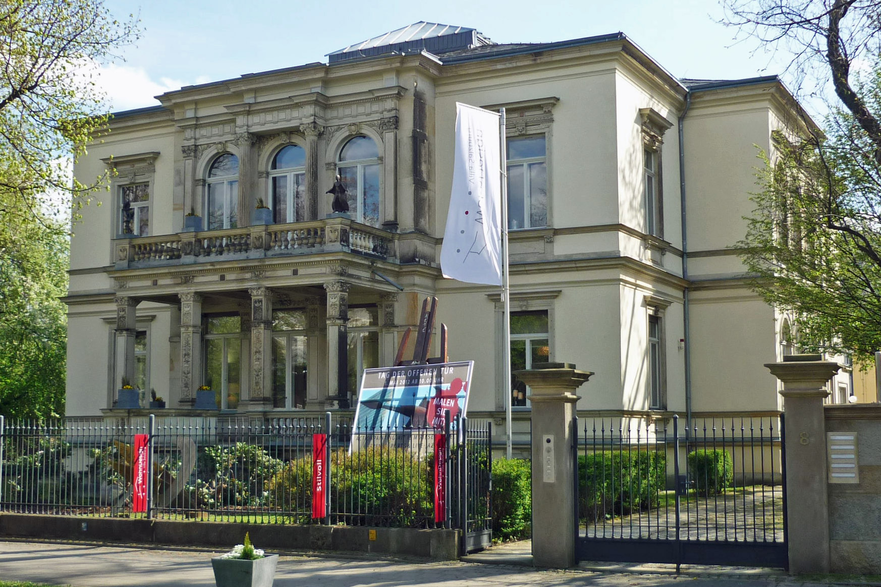 Tiergartenstr. 8 in Dresden-Strehlen